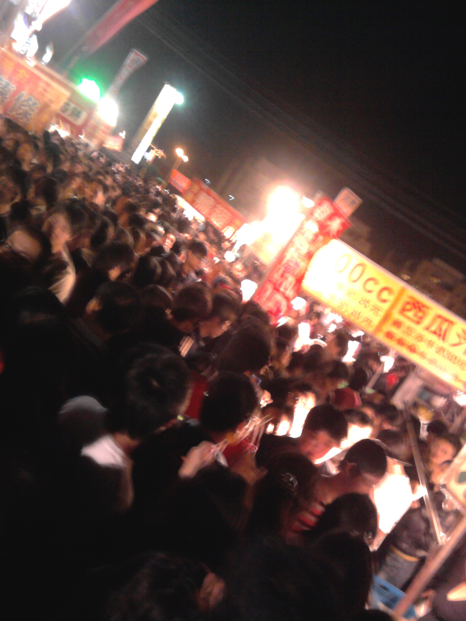 中文（台灣）: 臺南市花園夜市的人潮。